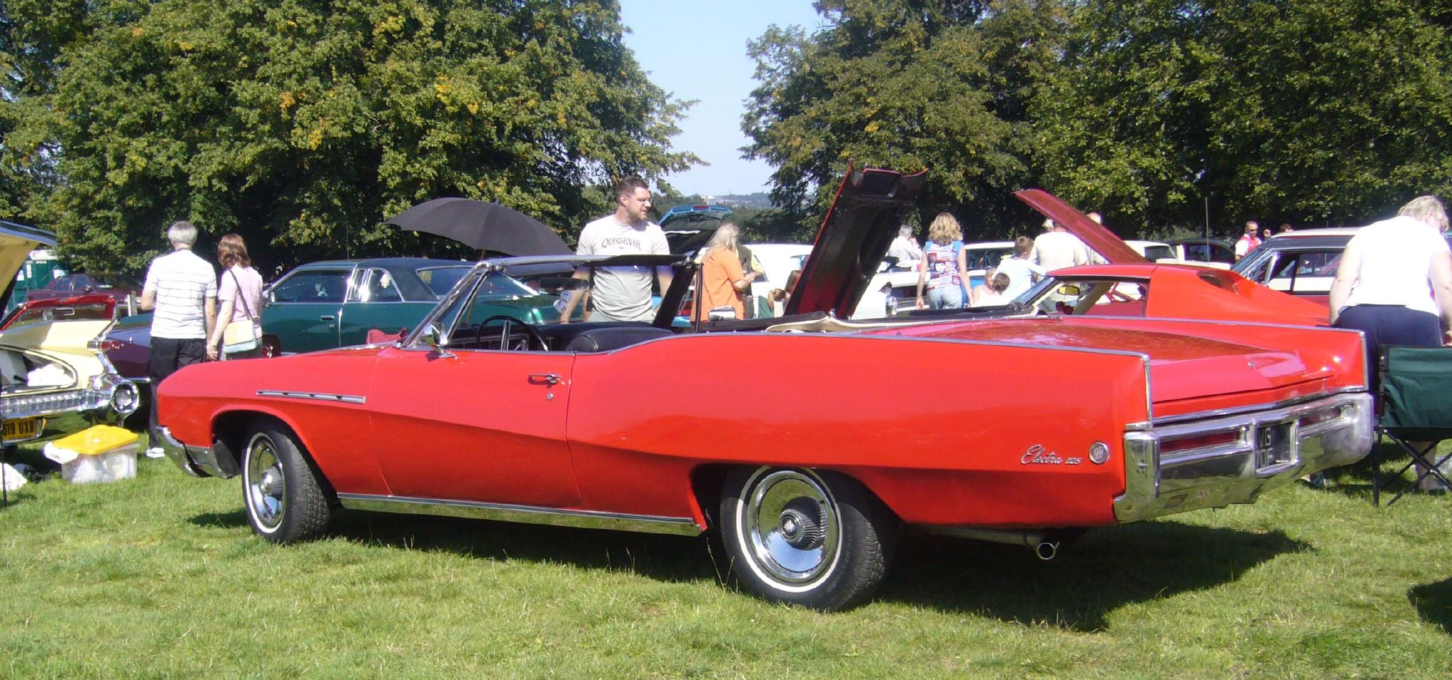 1968 Buick Electra 225 Convertible